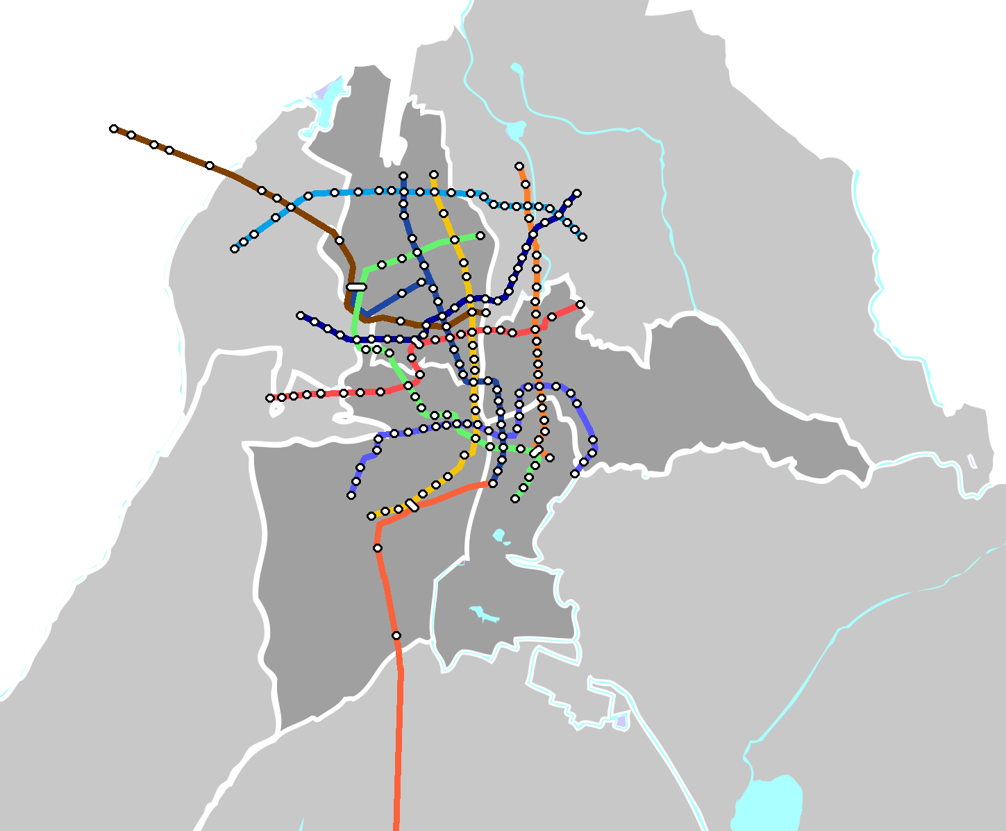 نقشه خطوط مترو در برنامه آینده شهر اورومچی